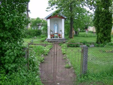 Mažonų kapinės